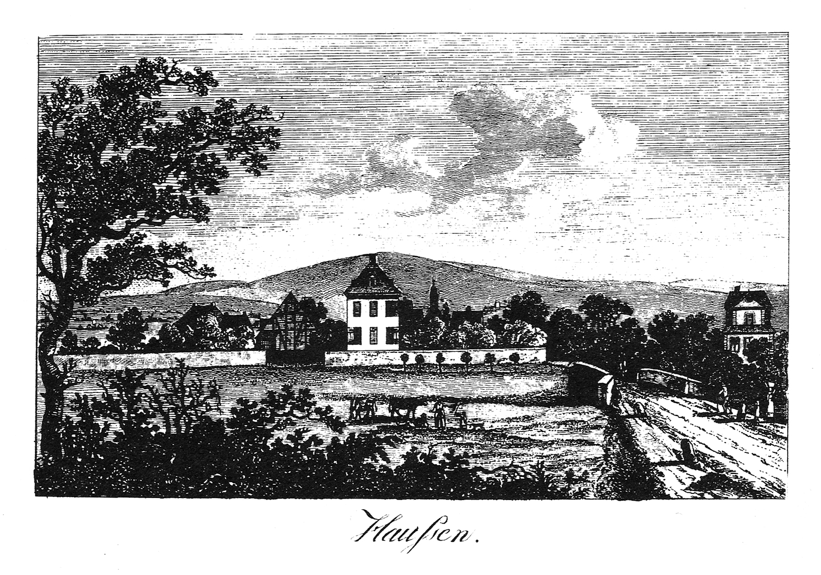 „Haussen“ – Ansicht von Hausen um 1800 (Kupferstich)